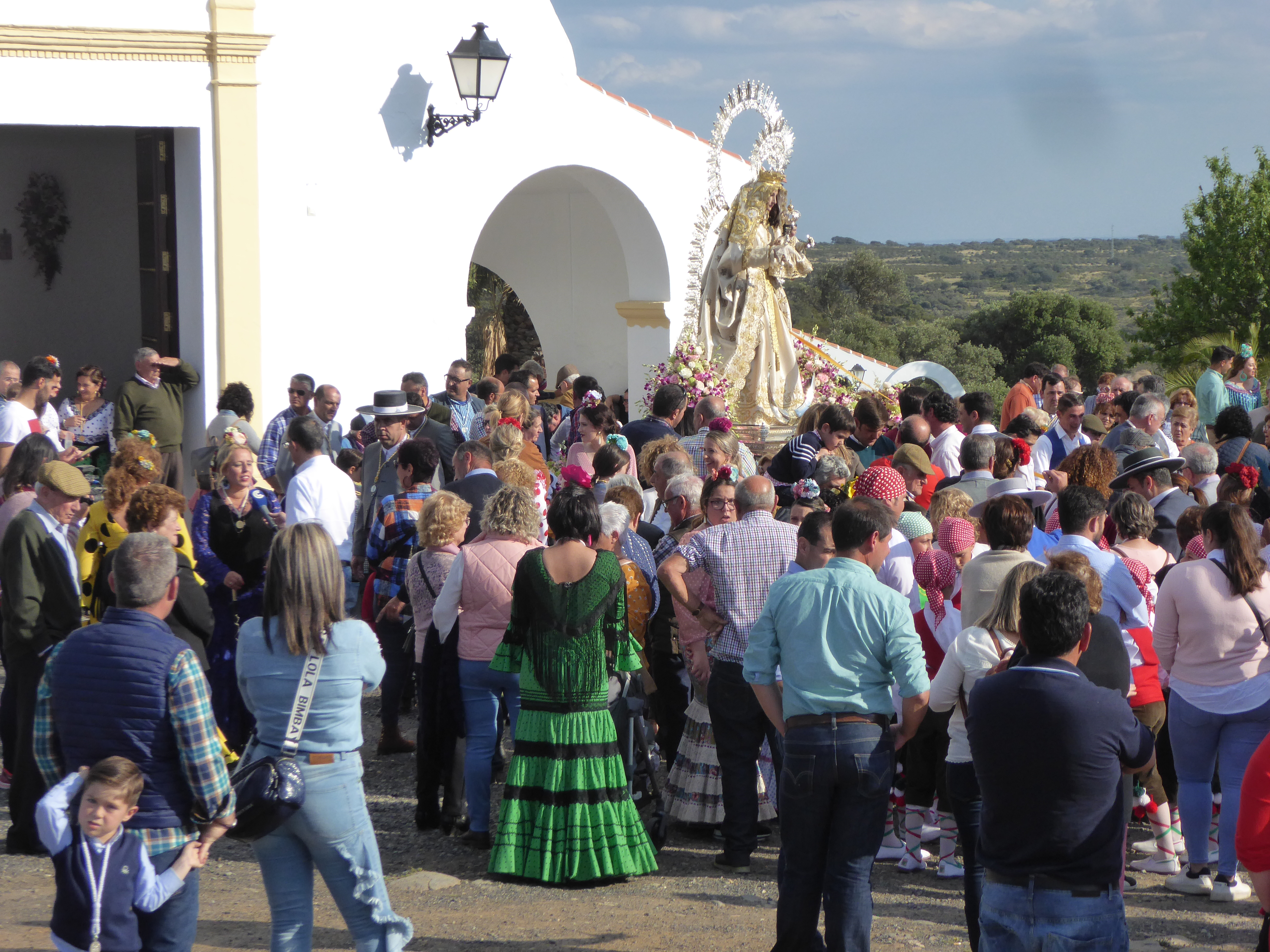 Romería de Nuestra Señora de Piedras Albas, año 2019. Salida al exterior de la imagen.